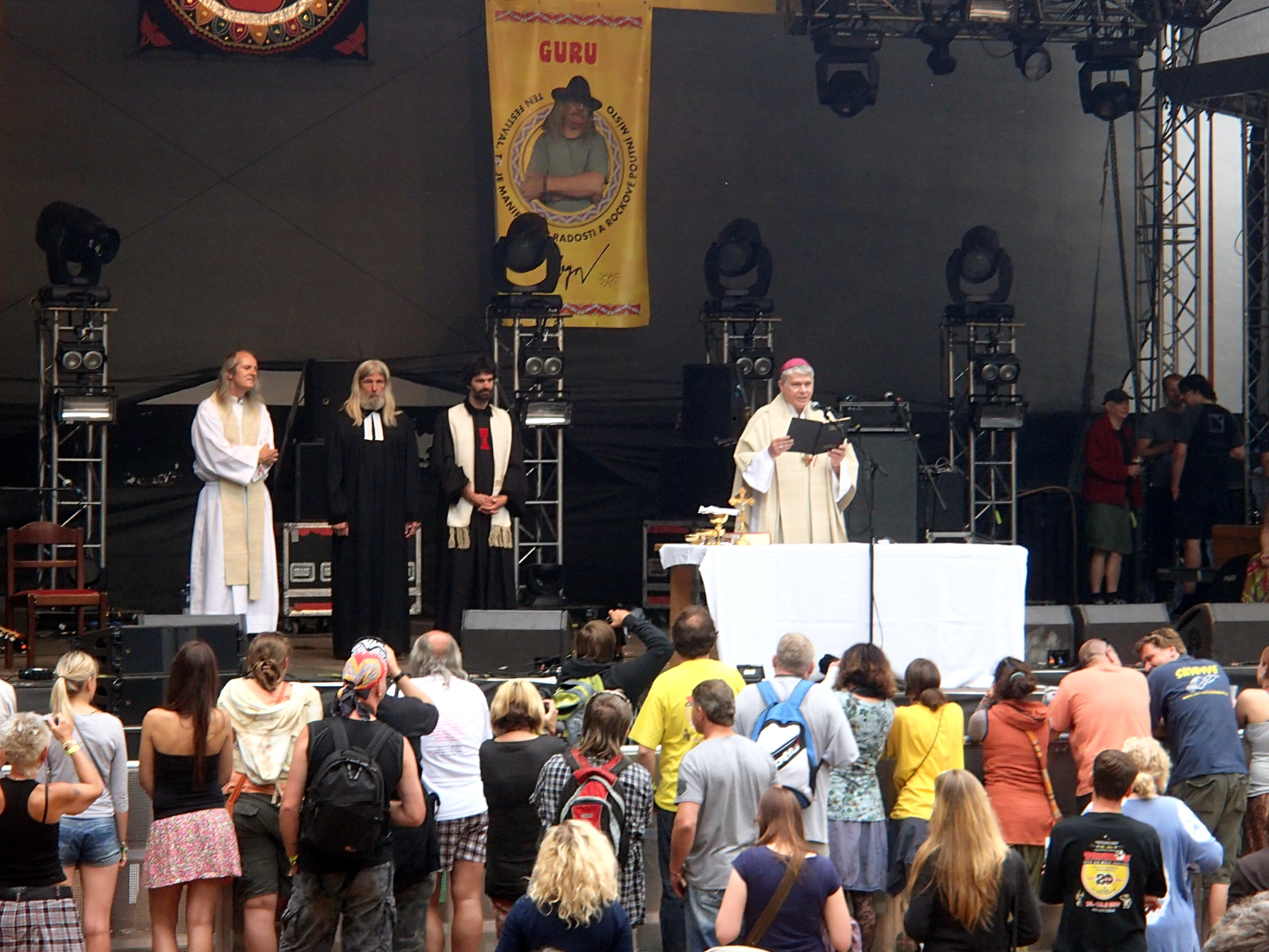 Trutnov Open Air Music Festival 2012 - ekumenická bohoslužba